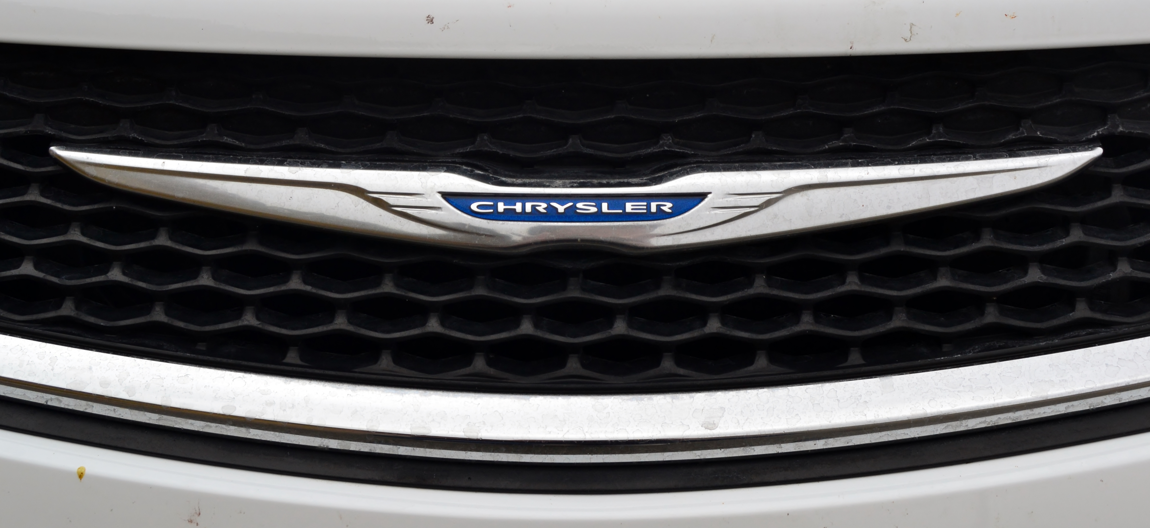 Chrysler 200 - Exterior - Detalle logo Chrysler